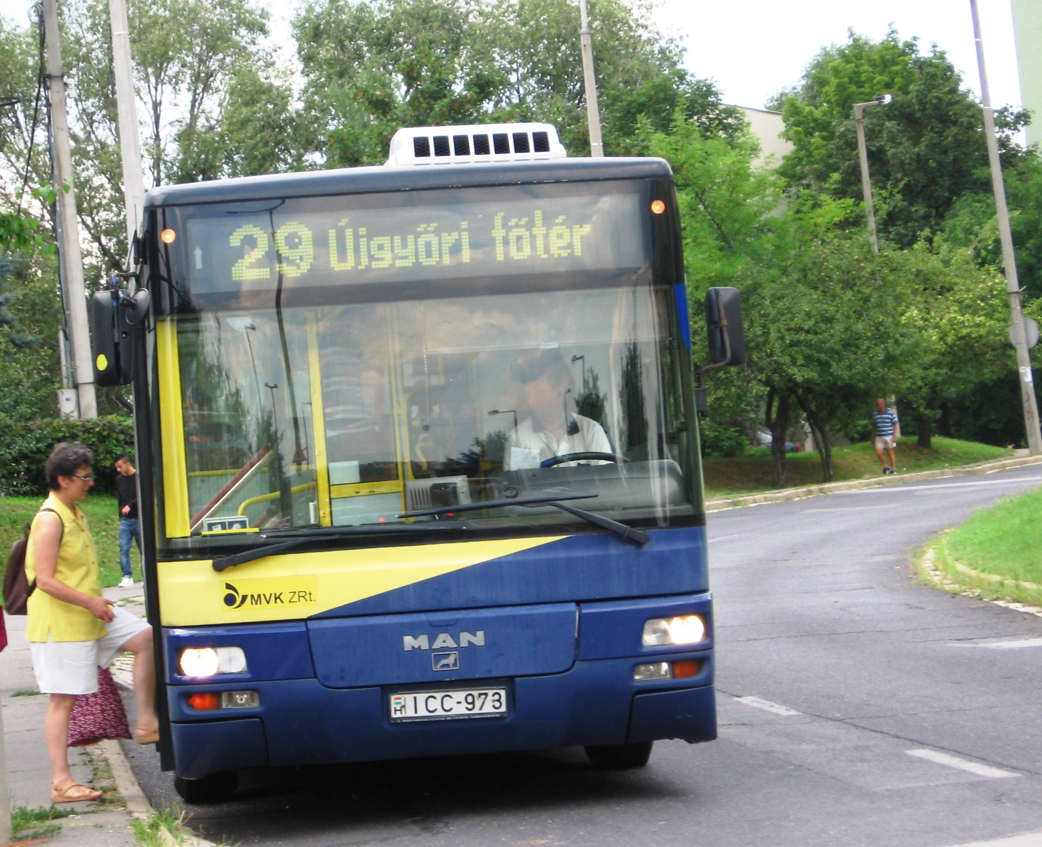 Normál padlós MAN busz Miskolcon.